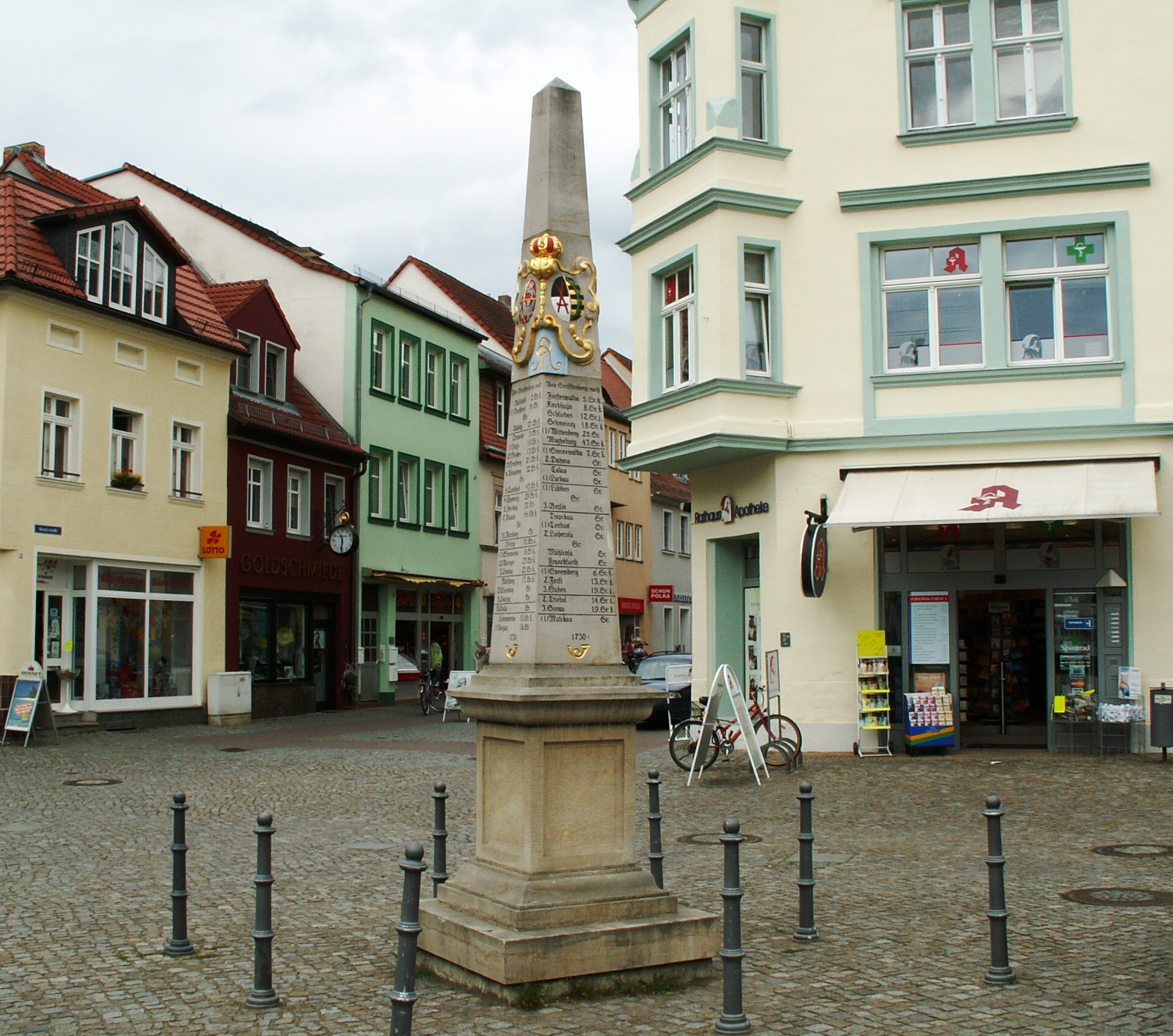 Kursächsische Postsäule auf dem Senftenberger Markt